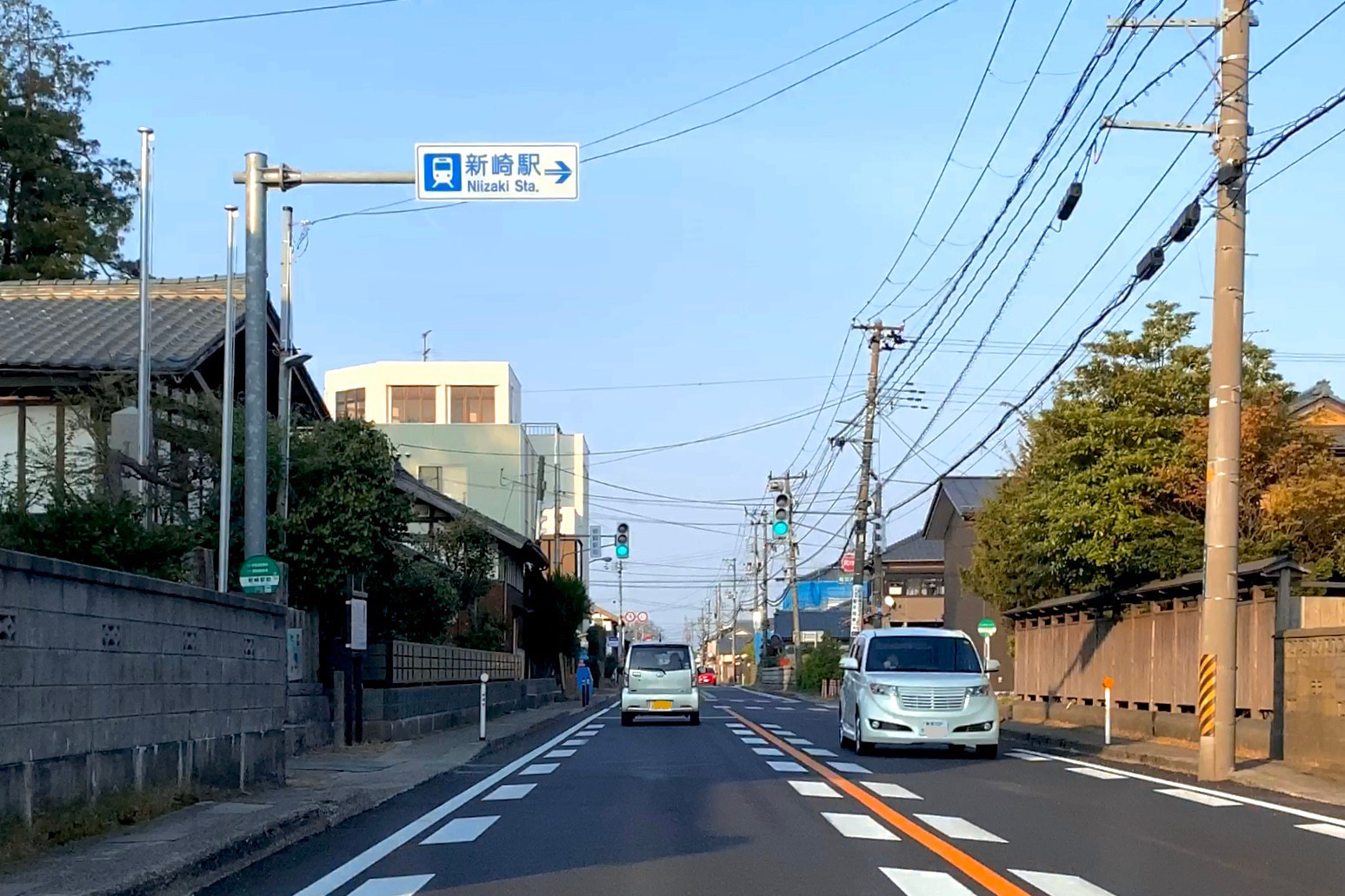 新潟県道3号新潟新発田村上線 「新崎駅前」交差点付近（新潟市北区，2020年4月）